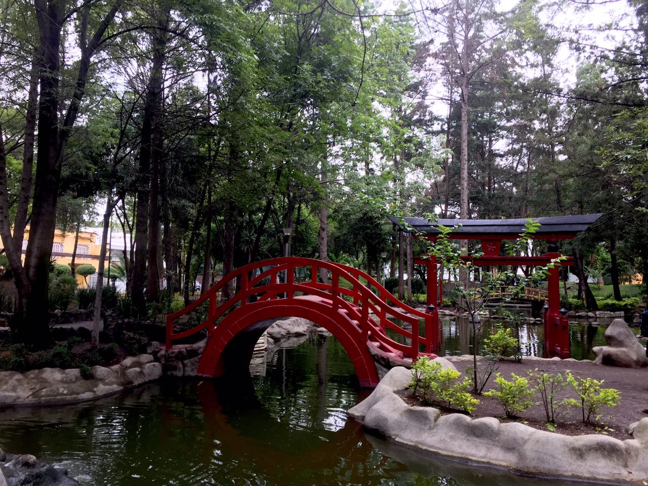 Puente del Parque Masayoshi Ōhira en la Ciudad de México